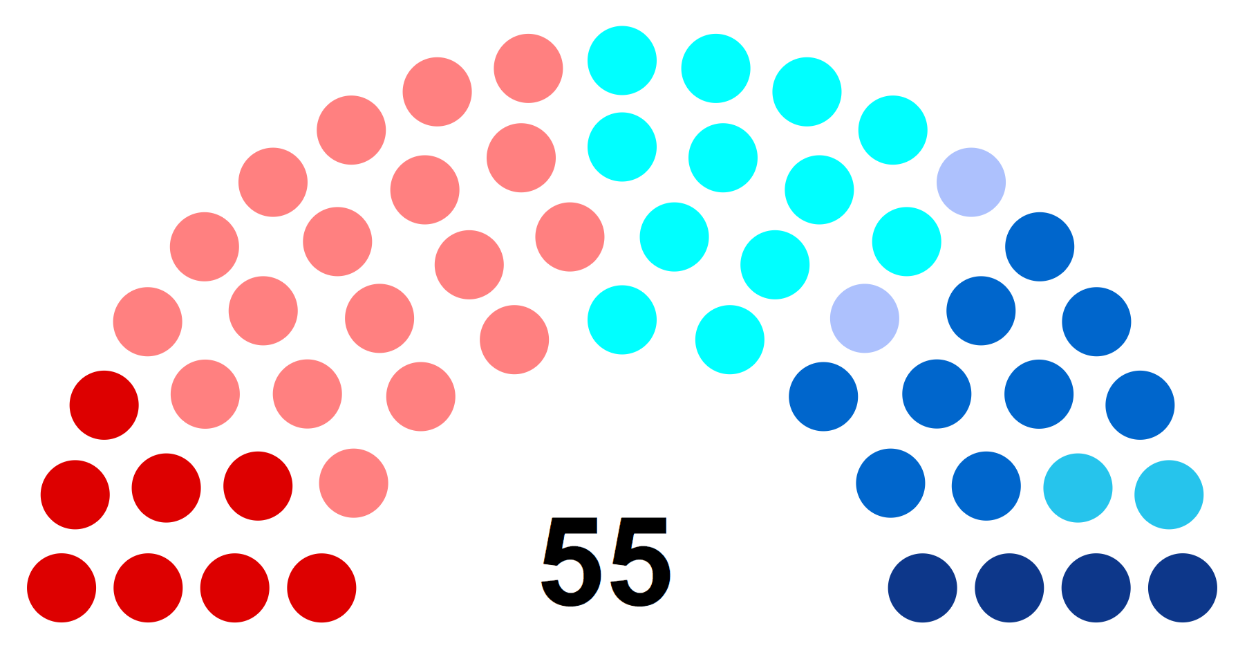 Partis politiques représentés au Conseil régional de Picardie en 1986